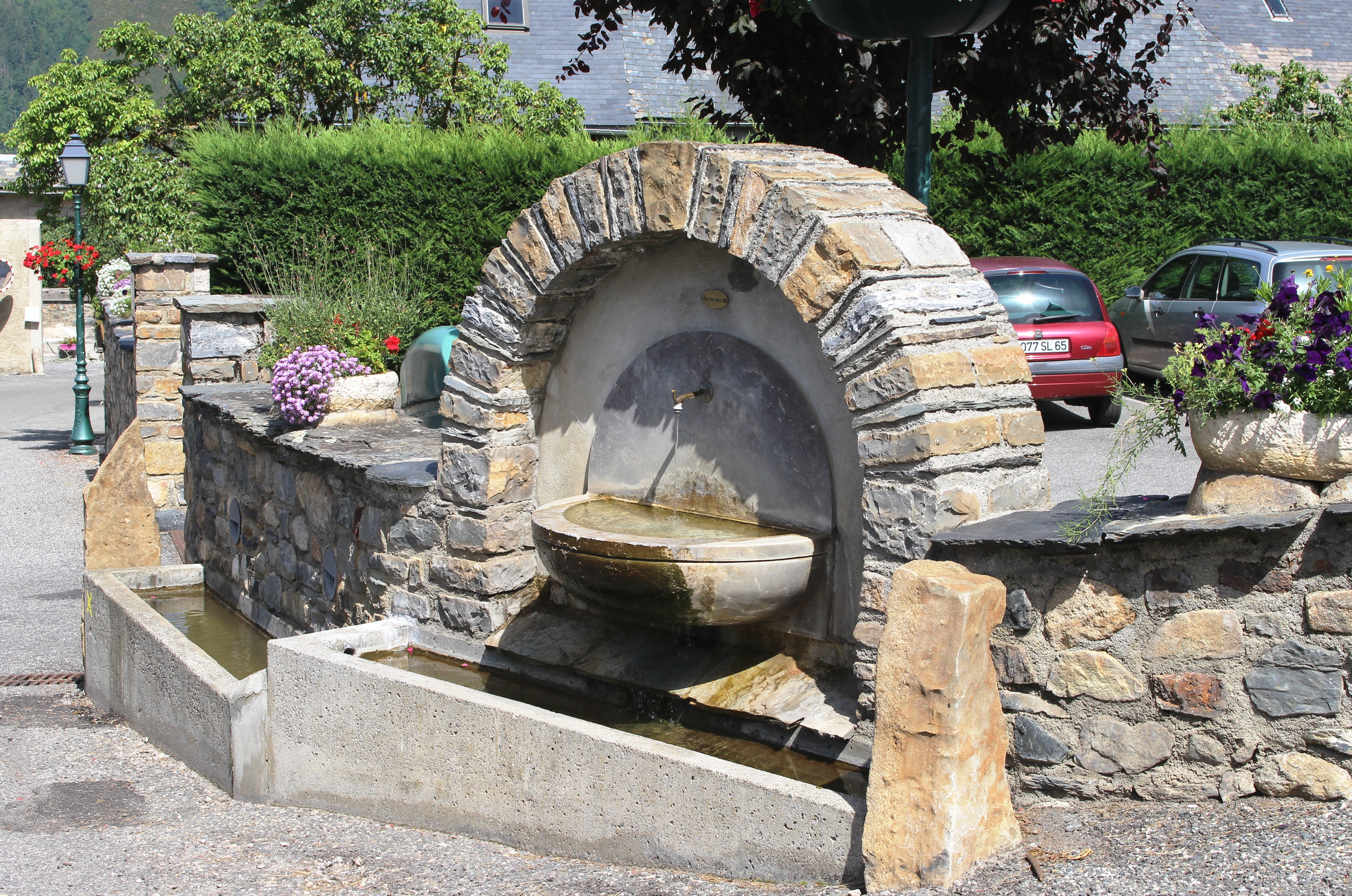 Fontaine de Sailhan (Hautes-Pyrénées)